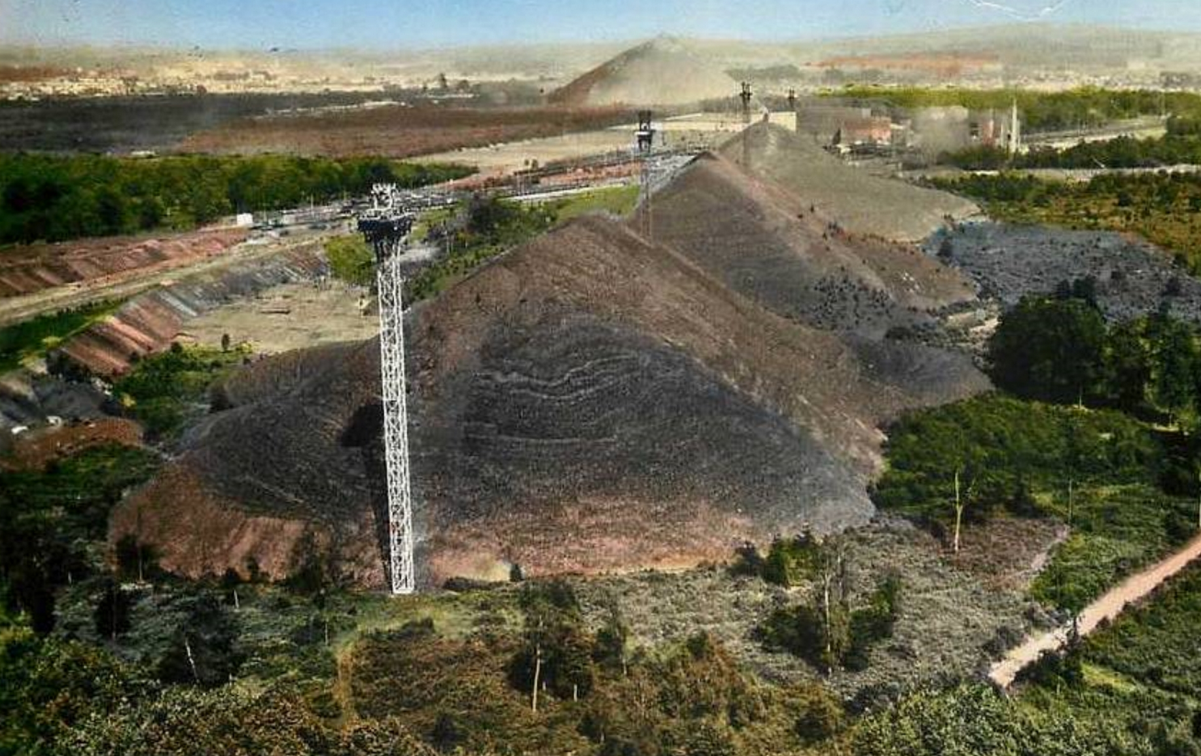 Terril n° 176 dit Lavoir Rousseau, Compagnie des mines d'Anzin, Raismes, Nord, Nord-Pas-de-Calais, France.